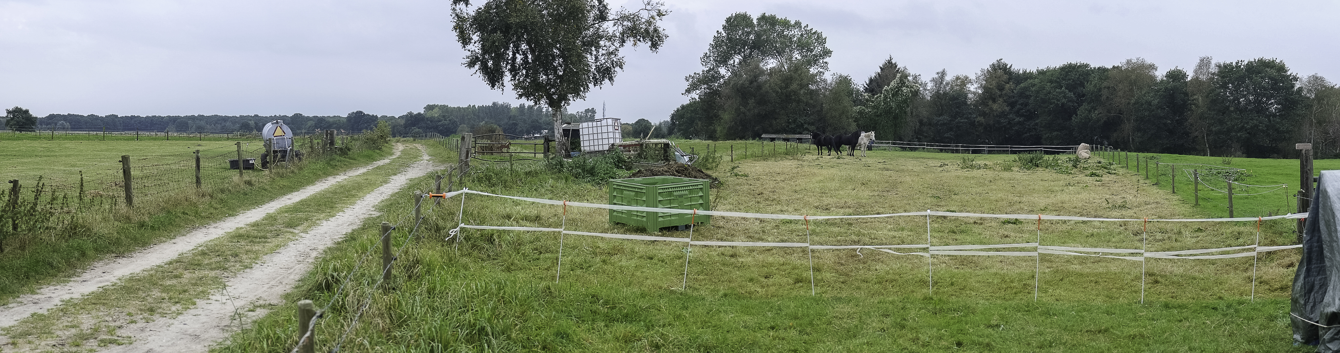 Vermoedelijke locatie hunebed G4